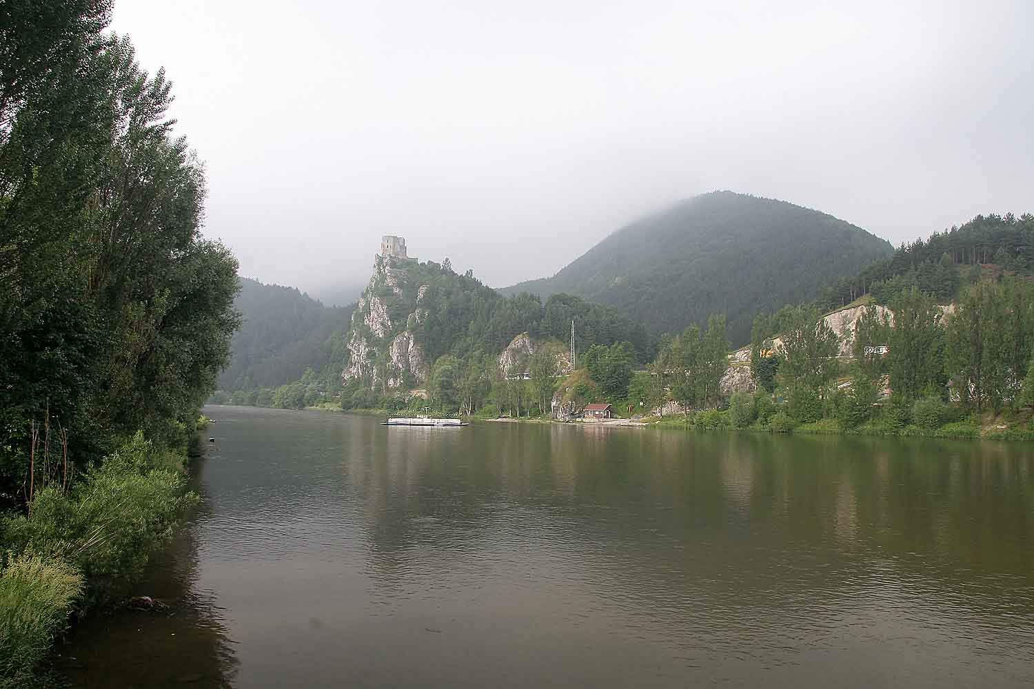 Castle Strečno, District Žilina, Slovakia autor: Prazak Date : 28. 6, 2006